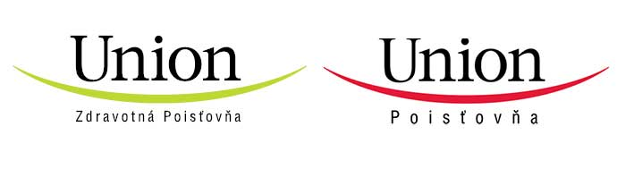 Logo